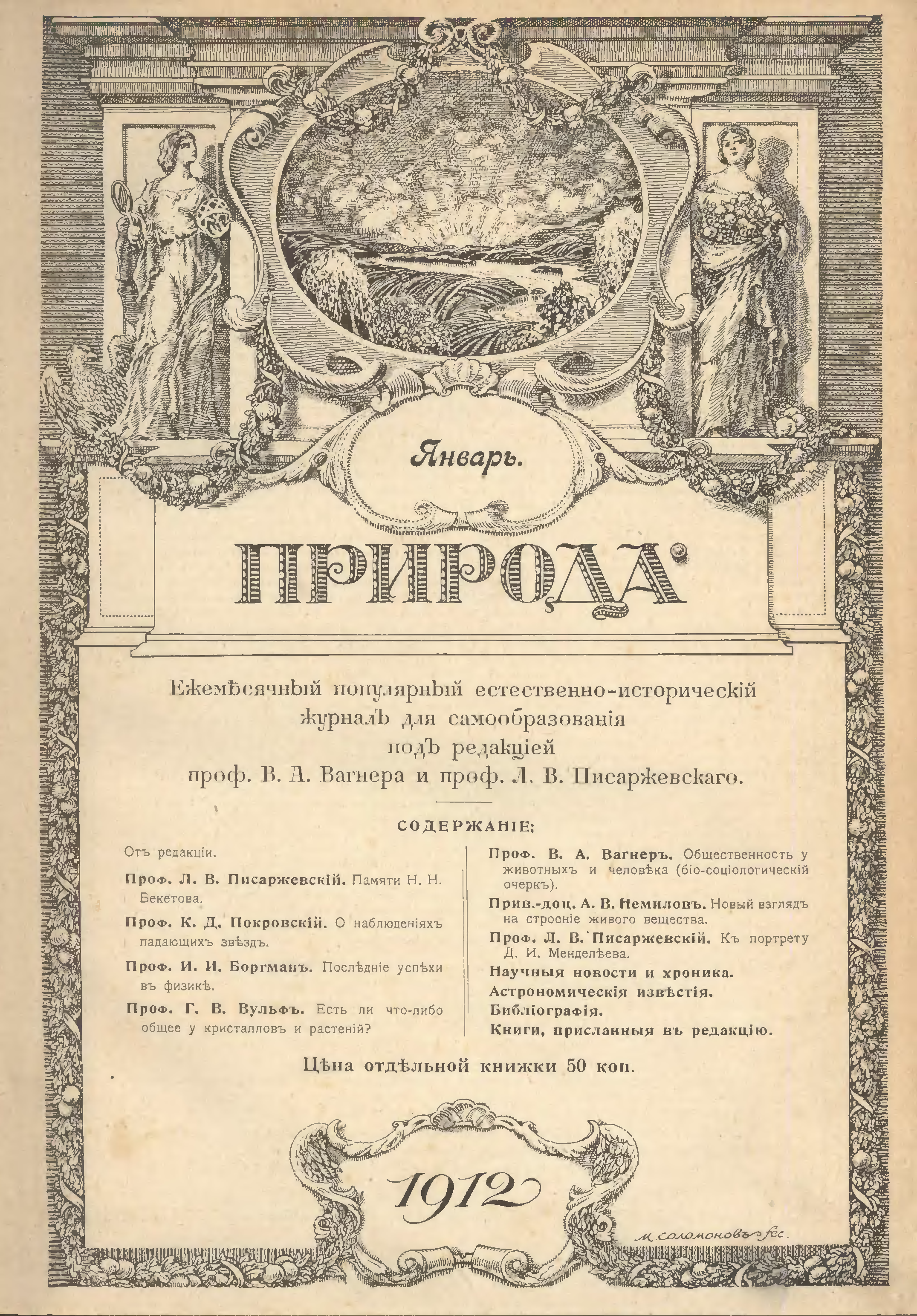 Обложка первого номера журнала «Природа» (№1, 1912 г.)